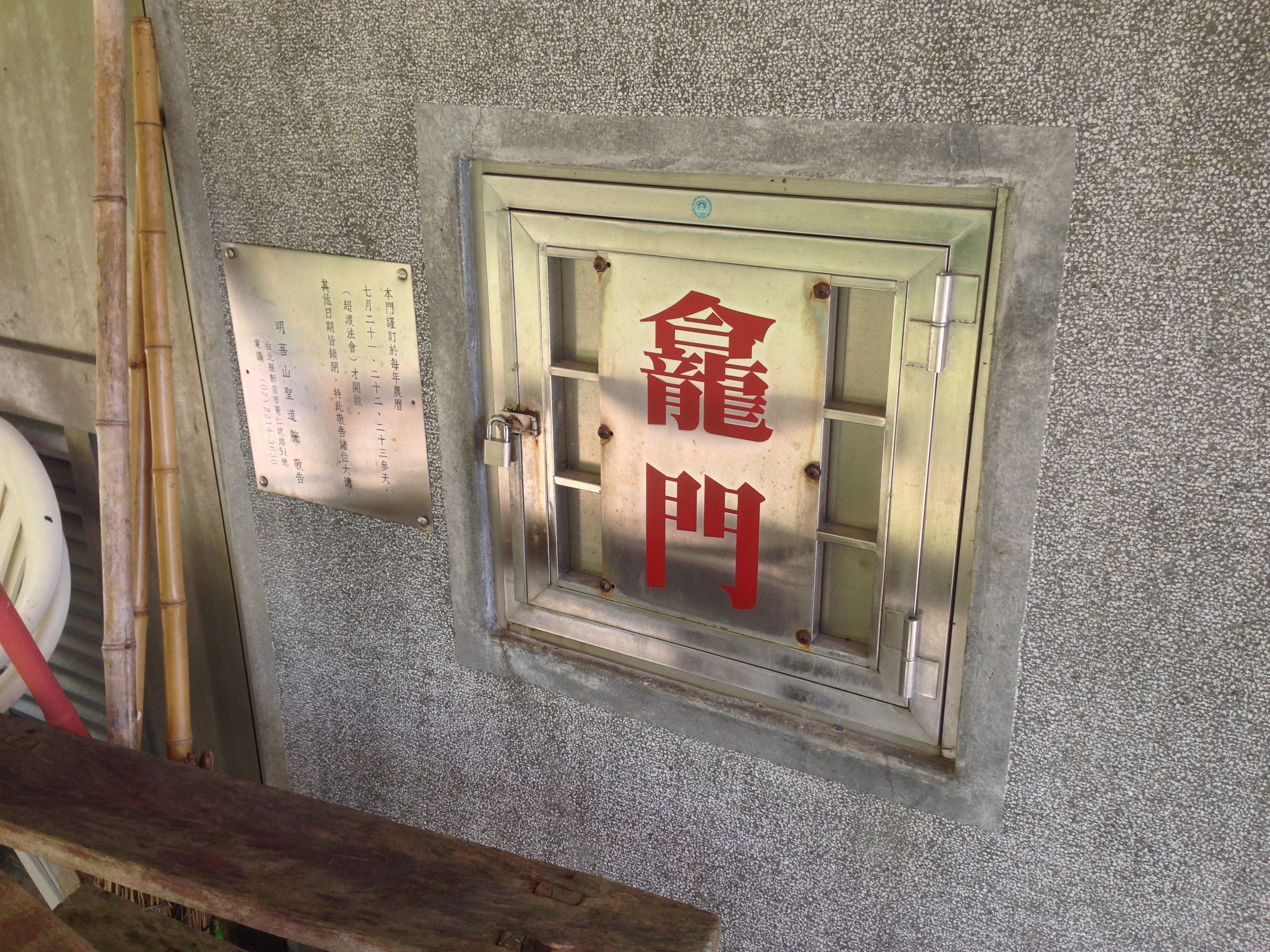 北宜公路殉職先靈紀念碑龕門